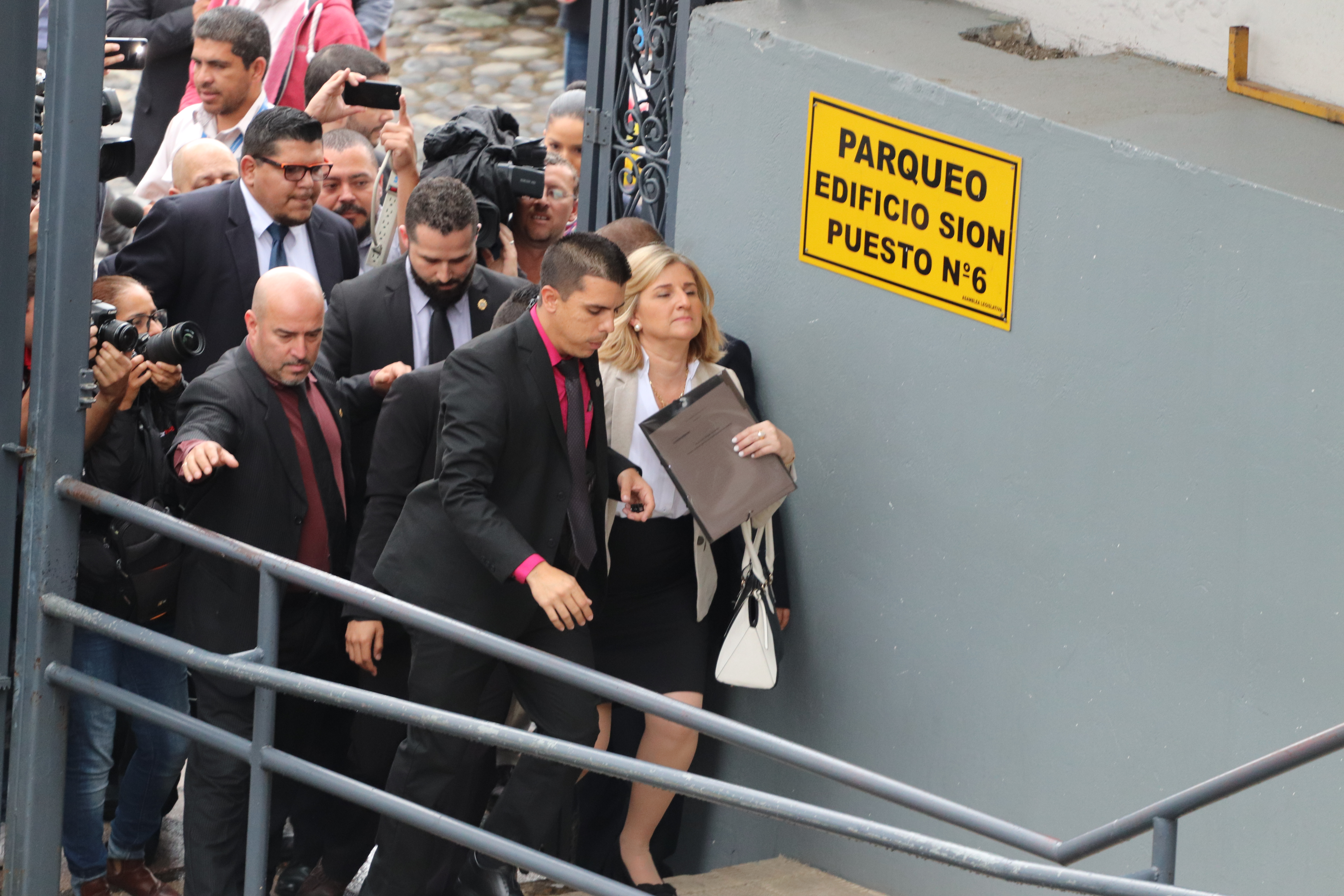 Emilia Navas Aparicio, Fiscala General de la República de Costa Rica ingresando a la Asamblea Legislativa para hacer un allanamiento